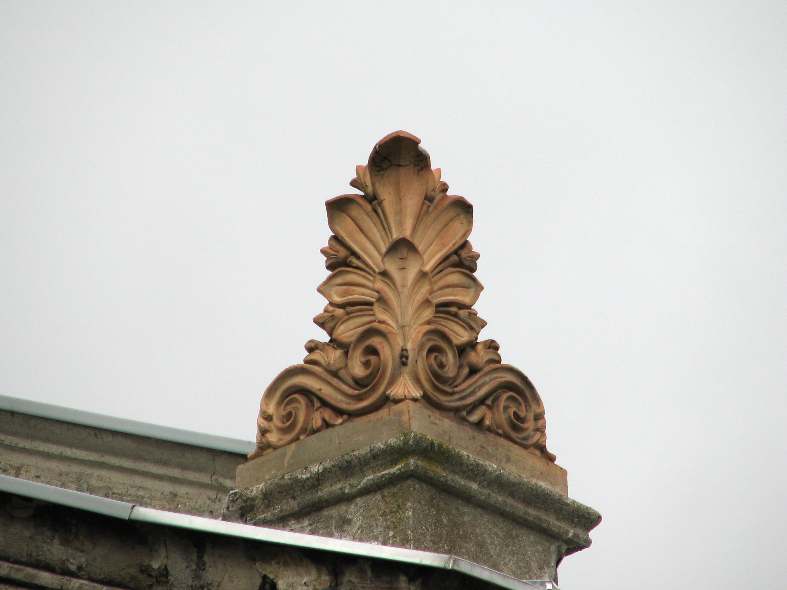 Zwieńczenie dachu na Dworze w Sarnowie